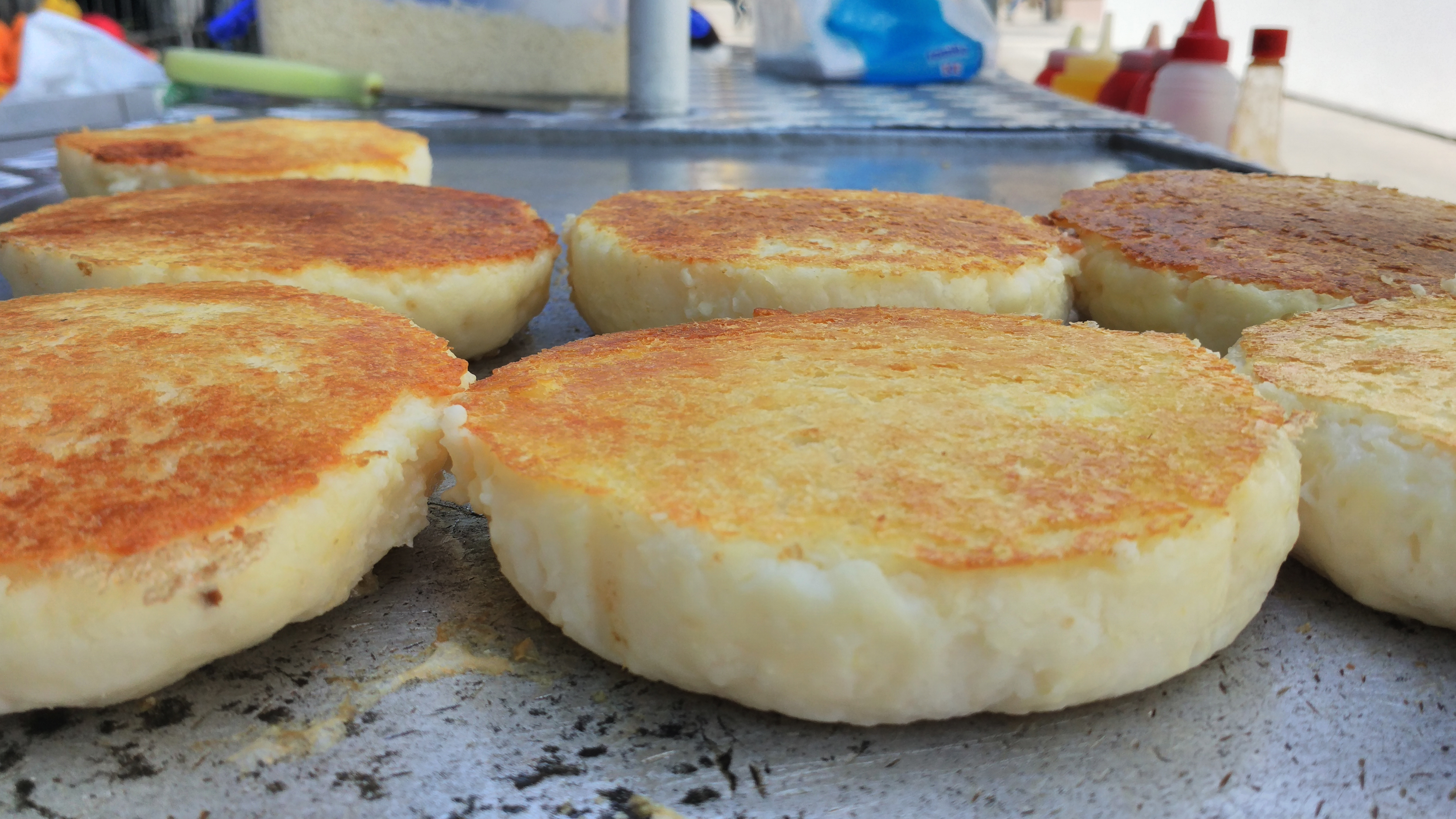 Arepas for sale in Cartagena, Colombia